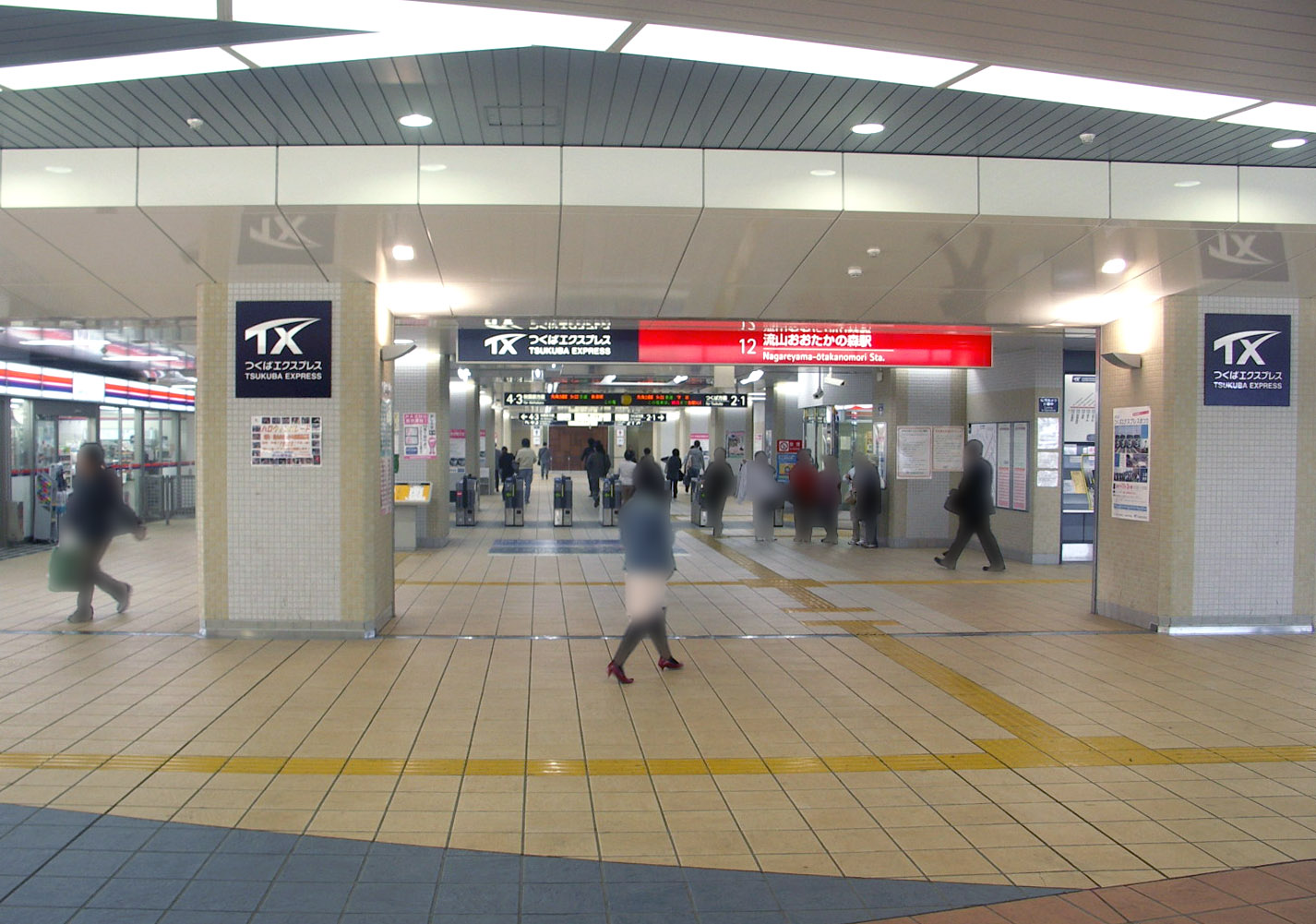 Nagareyama Otakanomori station ticket gates, Tsukuba Express, 流山おおたかの森駅TX改札口